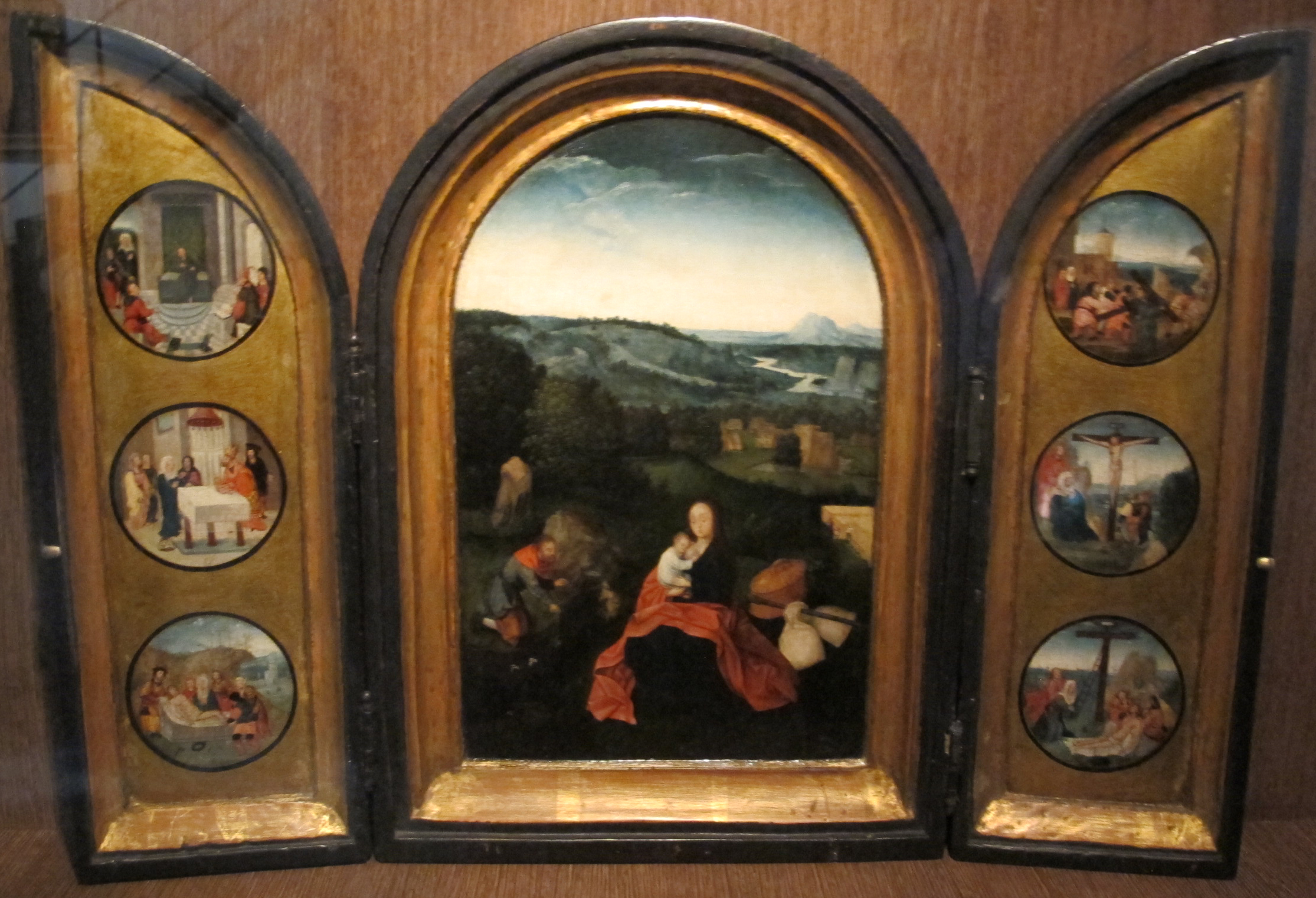 Seguace di joachim patinir, trittico con riposo dalla fuga in egitto, 1500-1550 ca.